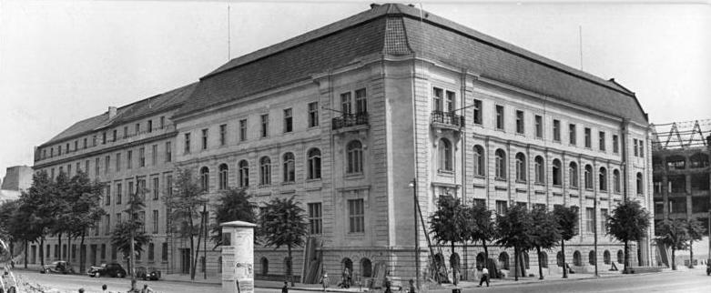 Berlin, Akademie der Wissenschaften Deutsche Akademie der Wissenschaften zu Berlin Jägerstr.-Ecke Gendarmenmarkt. Akademie der Wissenschaften der DDR Das Gebäude wurde acht Tage vor dem festgesetzten Bautermin (15.6.50) vorfristig fertiggestellt. Aufn.: Illus Köhler 6786-50 9.6.50 do